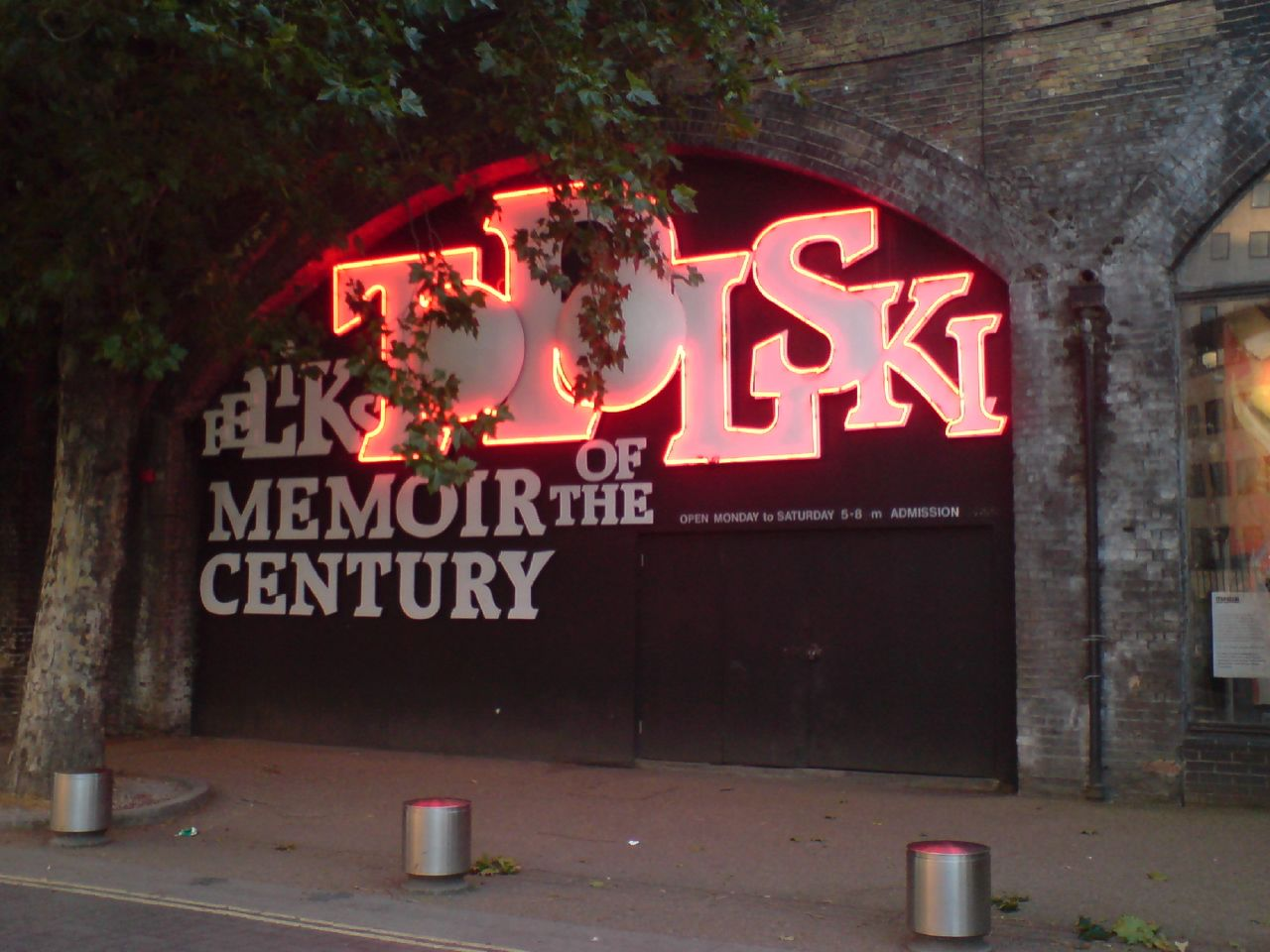 TOPOLSKI